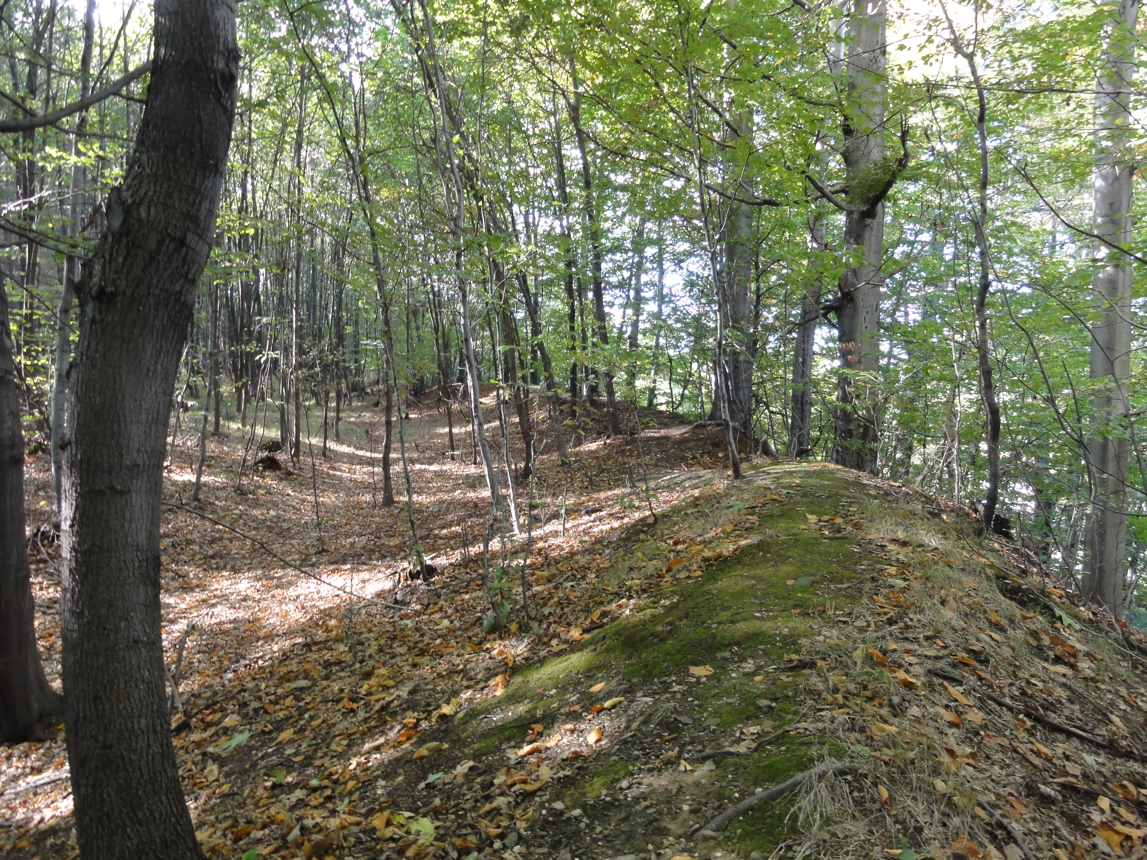 Międzyświeć Grodzisko 1 - obwałowanie północne